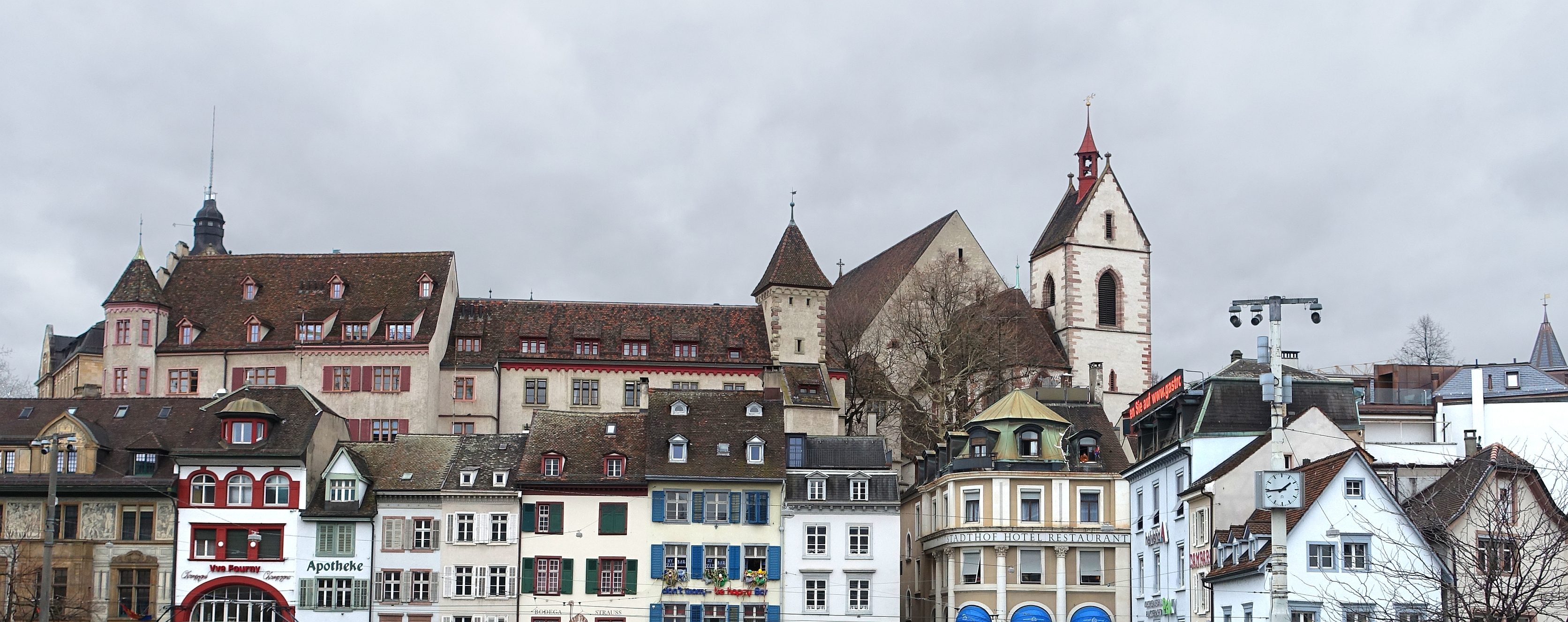 Panorama von Barfüsserplatz aus gesehen. Kohlberg, Lohnhof, Leonhardskirche